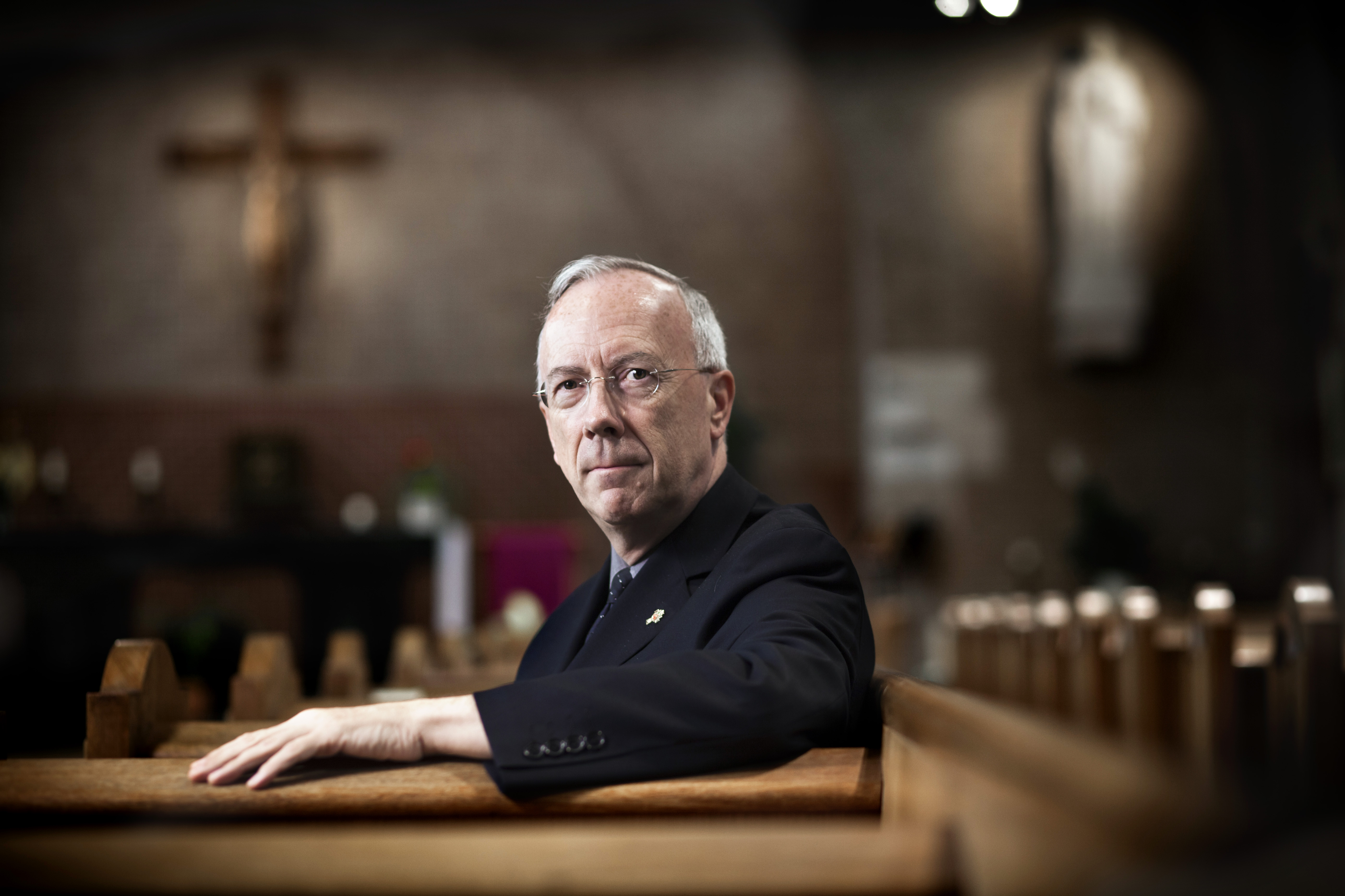 Portret van Broeder René Stockman, generaal overste Broeders van Liefde.